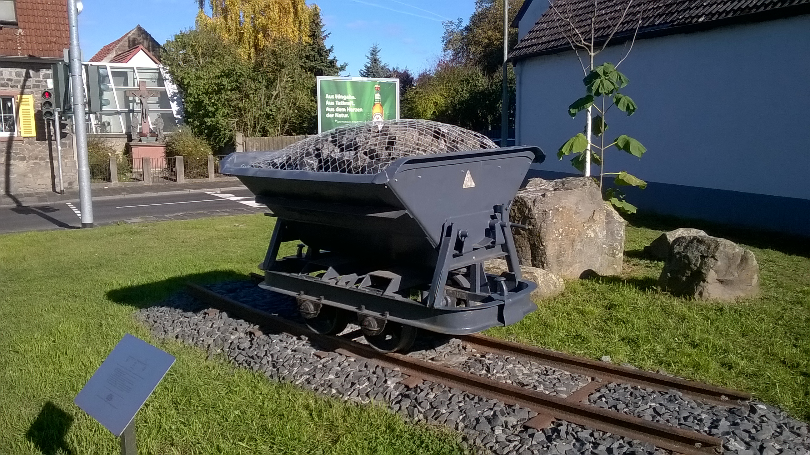 Rollwagen als Kipp-Lore. Techniksammlung anlässlich 1000 Jahre Dietesheim.